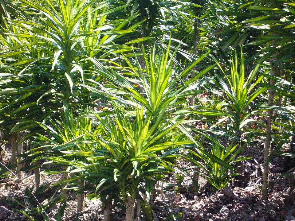 Plantación de una variedad de Caña India, para la exportación y uso como planta ornamental, La Cocaleca, Zaragoza